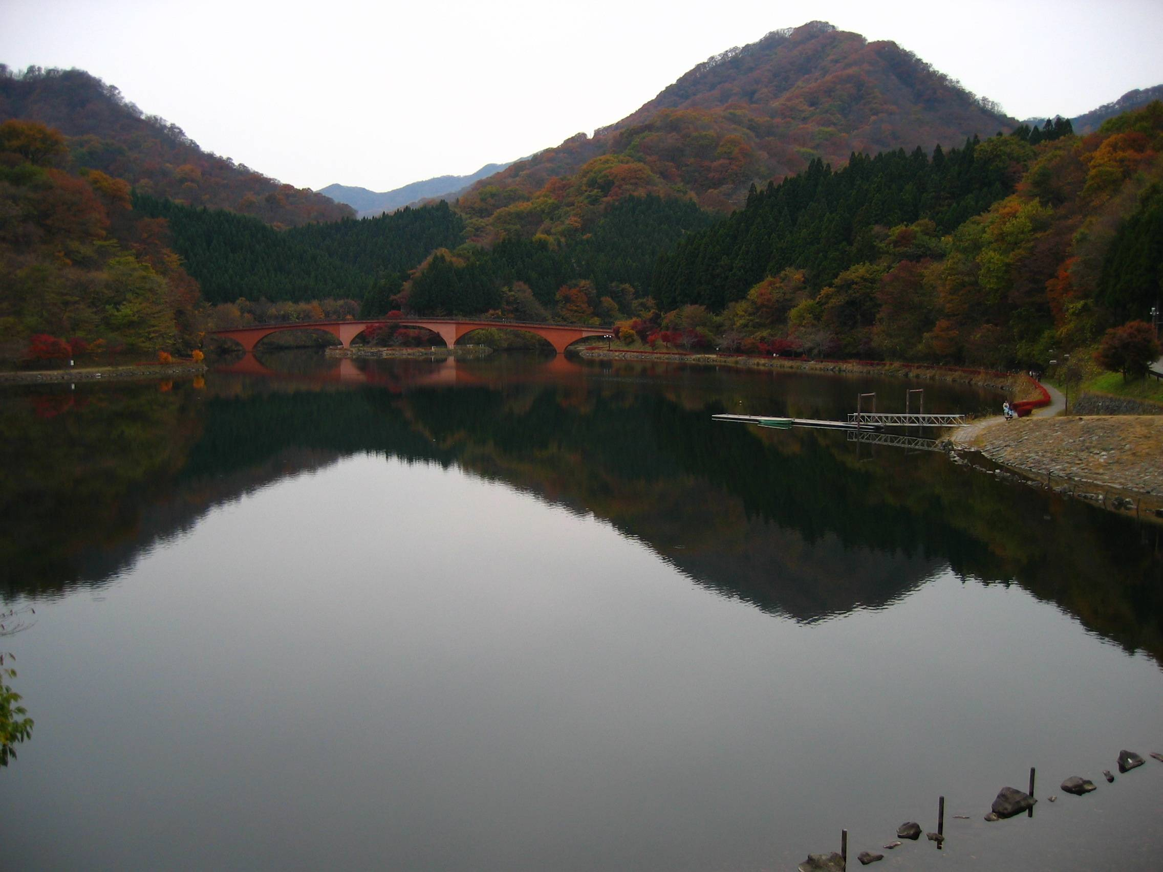 Sakamoto Dam (坂本ダム) makes lake Usui (碓氷湖).